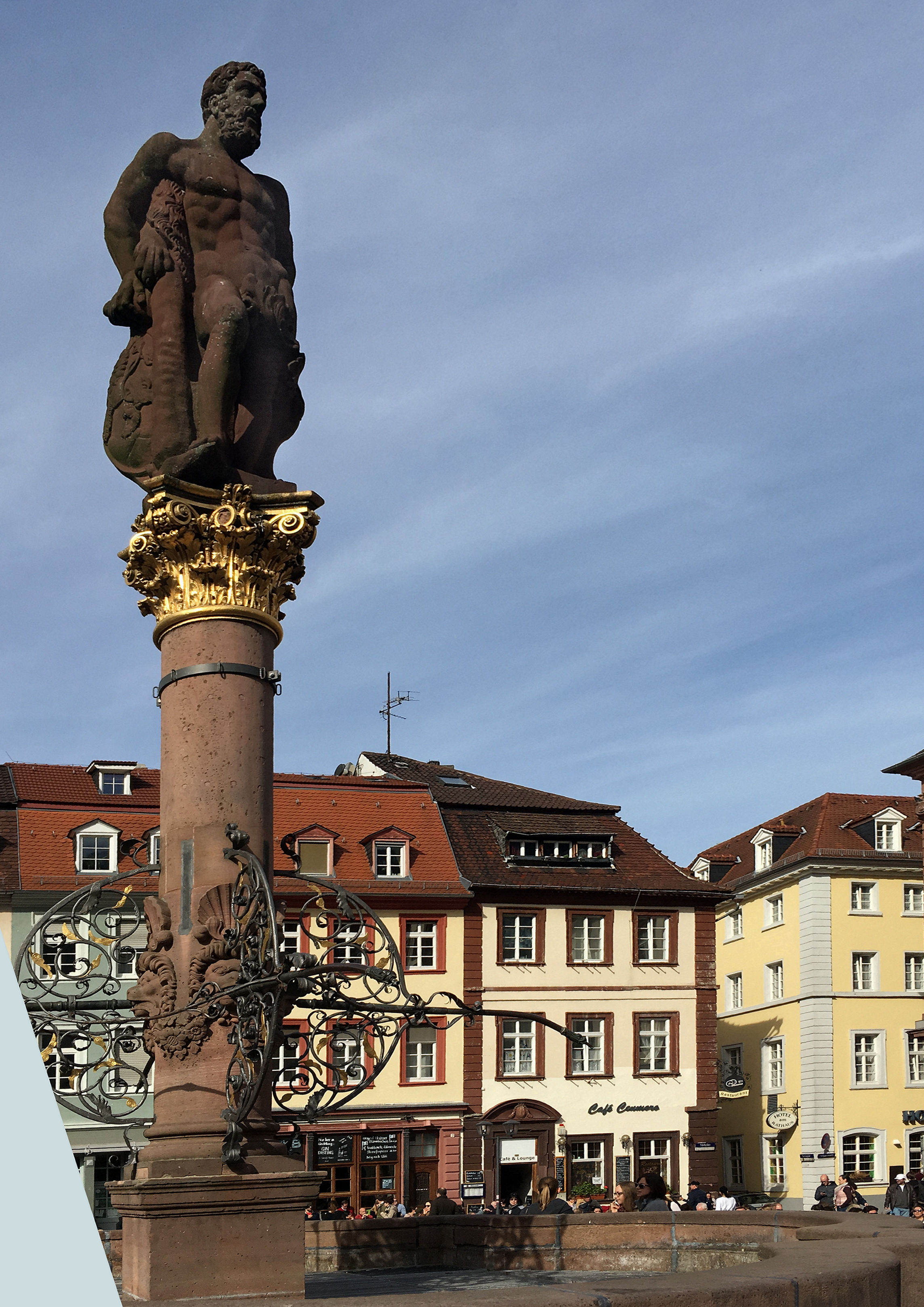 Place au centre ville